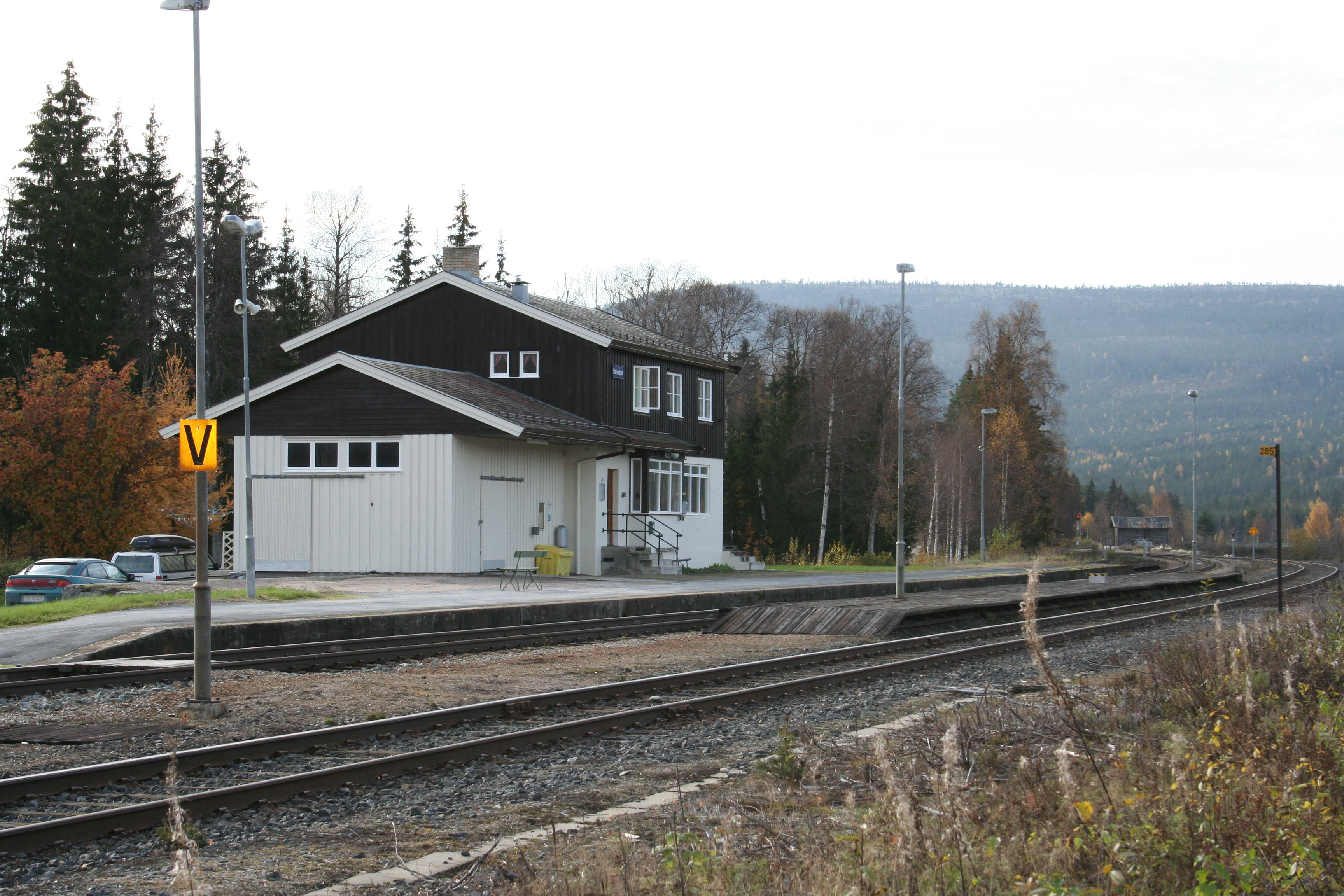 Hanestad stasjon